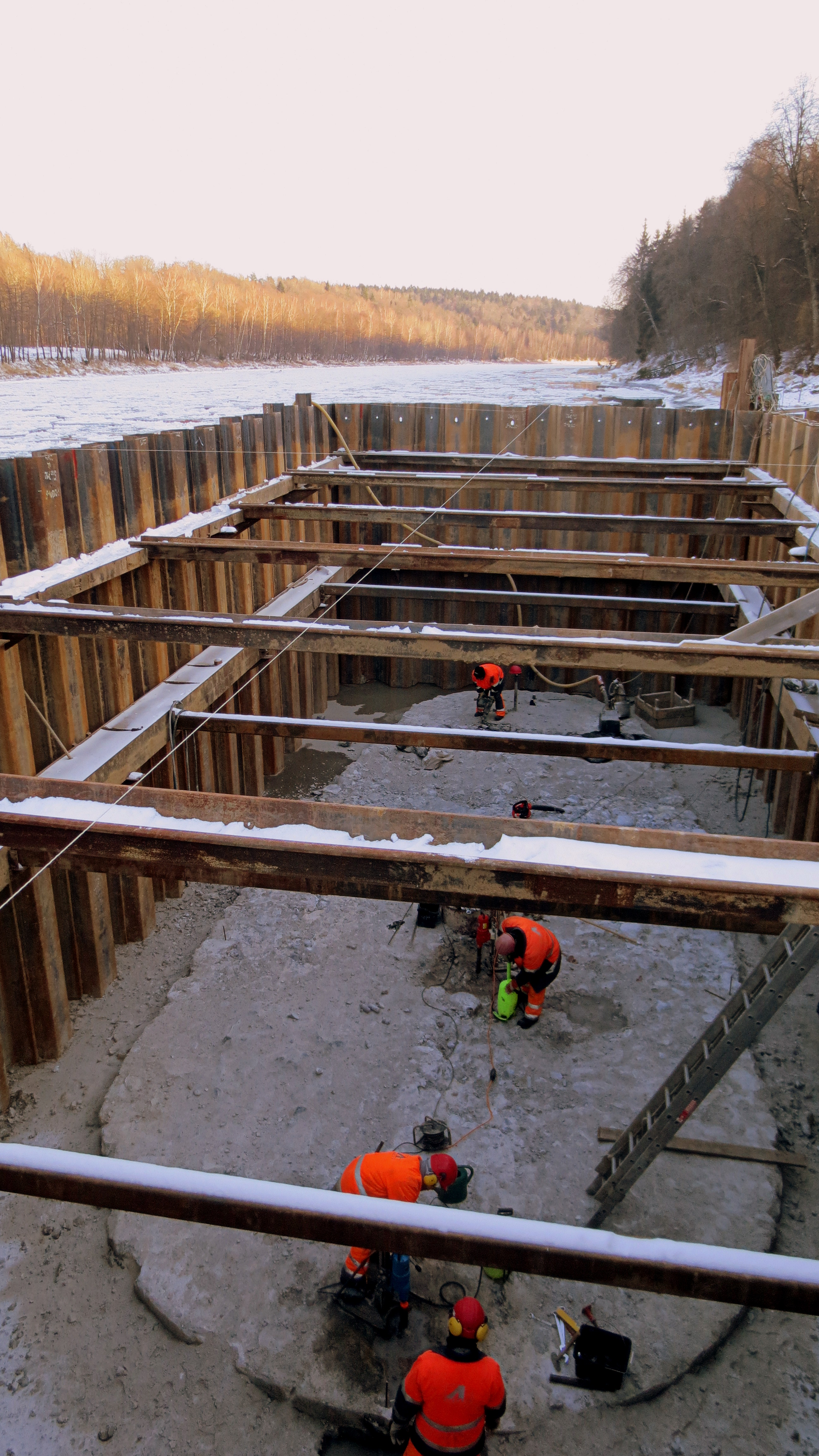 Upės vagoje išlikęs ir statybos metu atkastas geležinkelio tilto kairiojo tauro kesoninis pamatas